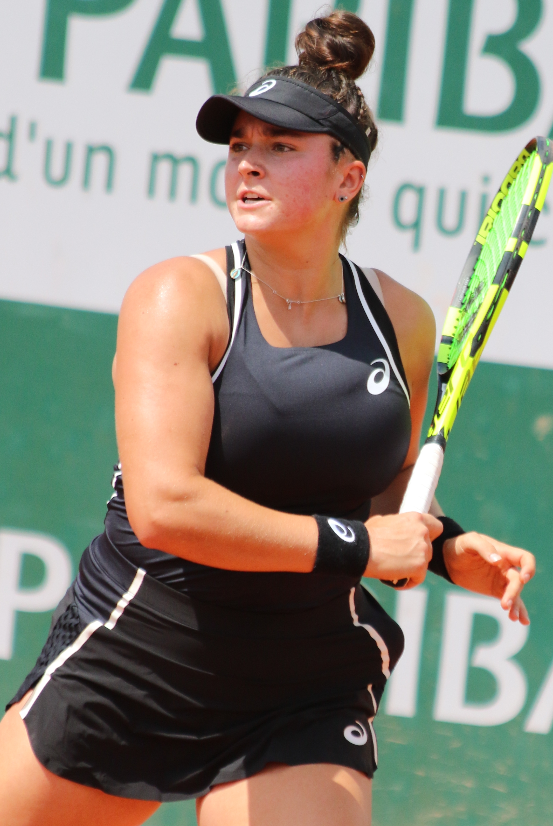 Dolehide RG18 (11)